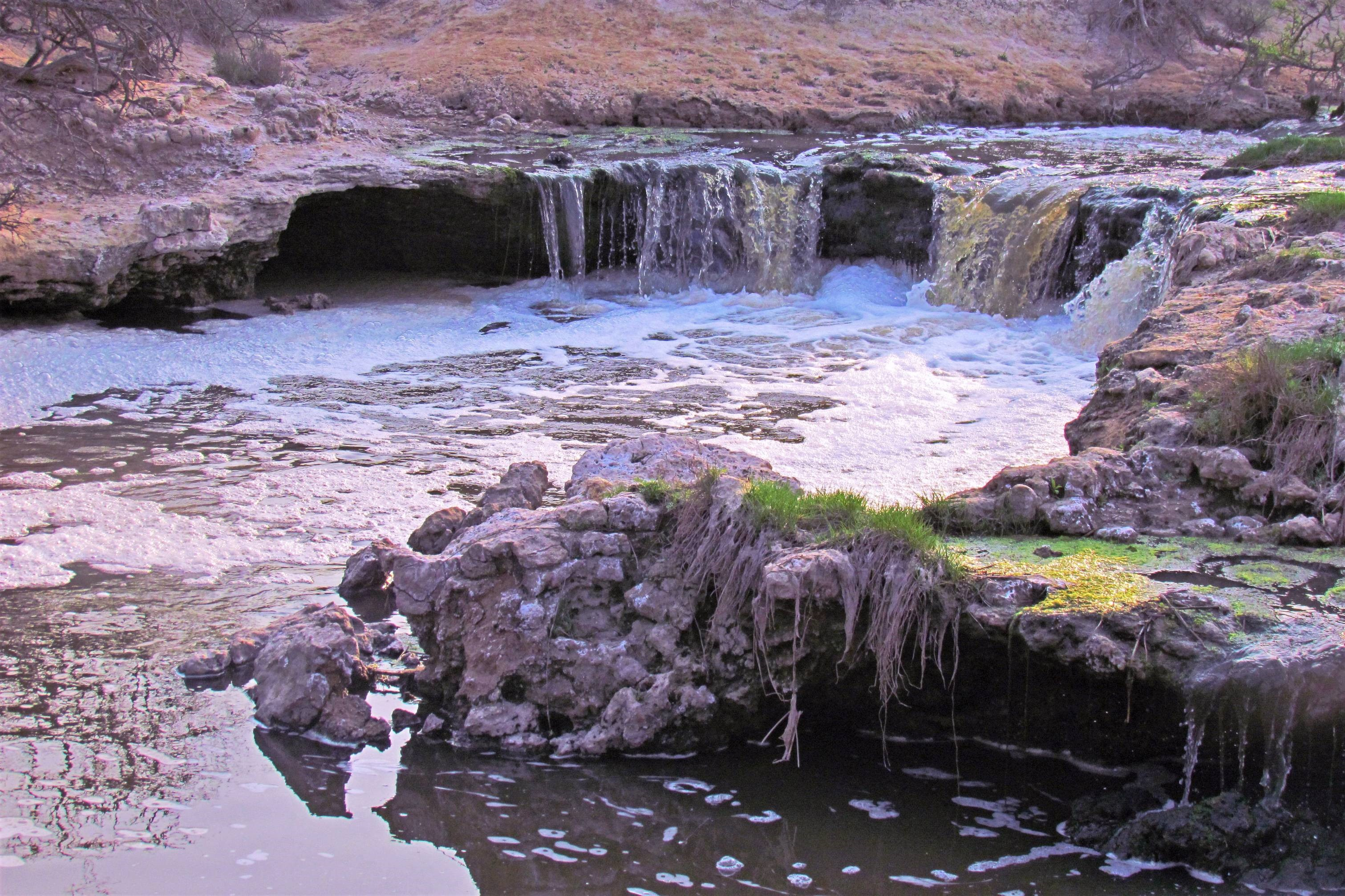 Descripción paisajística de la zona rural de Progreso (Santa Fe)